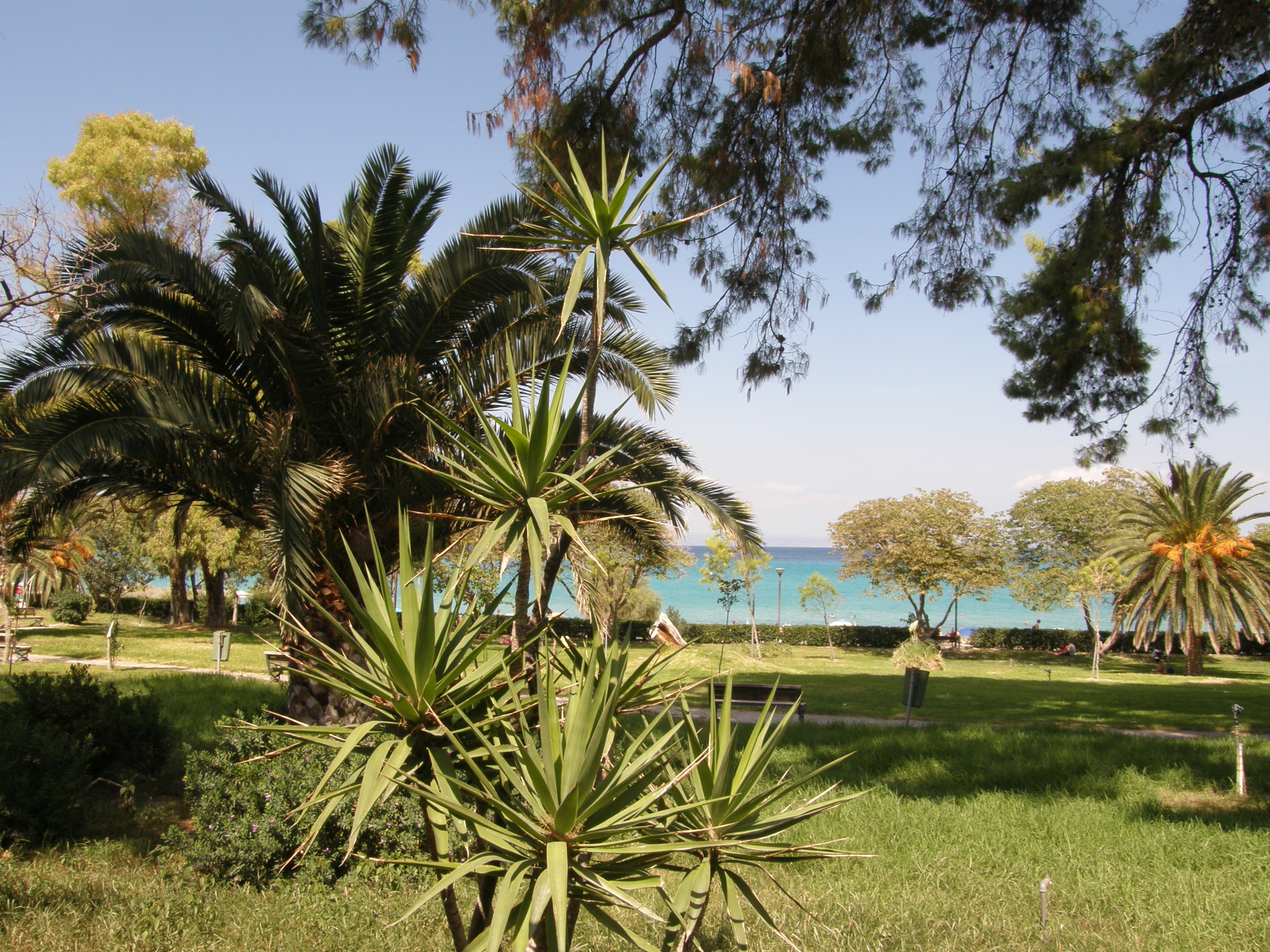 Hanioti